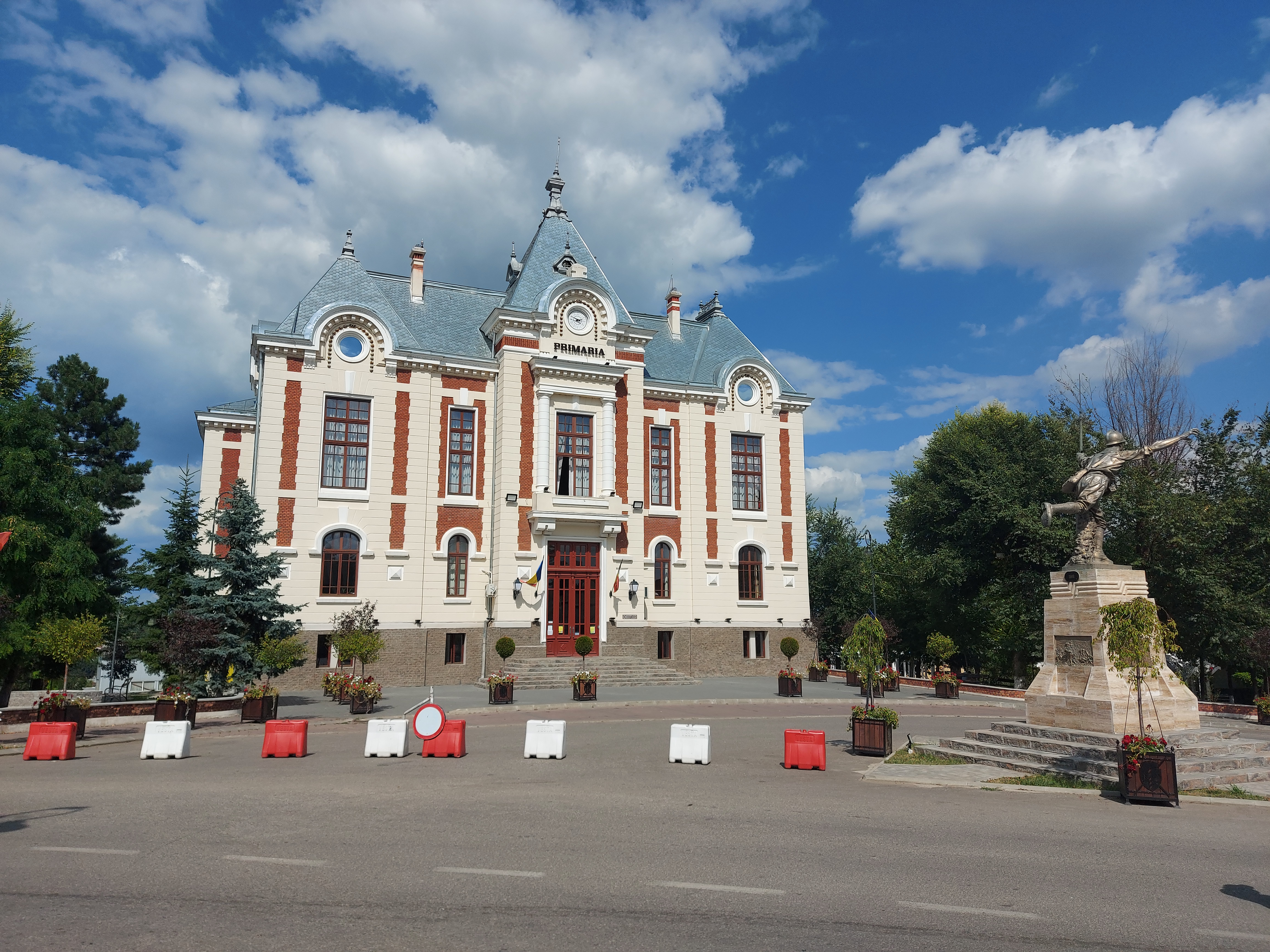 Primăria Dorohoi. Monument istoric.